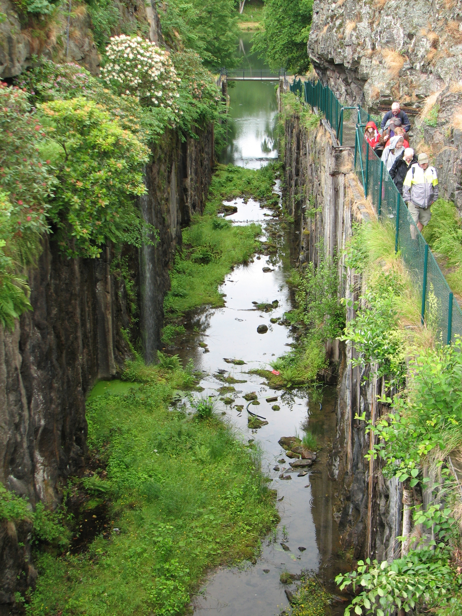 De eldste slusene i Trollhätte kanal var her, og åpnet i år 1800.